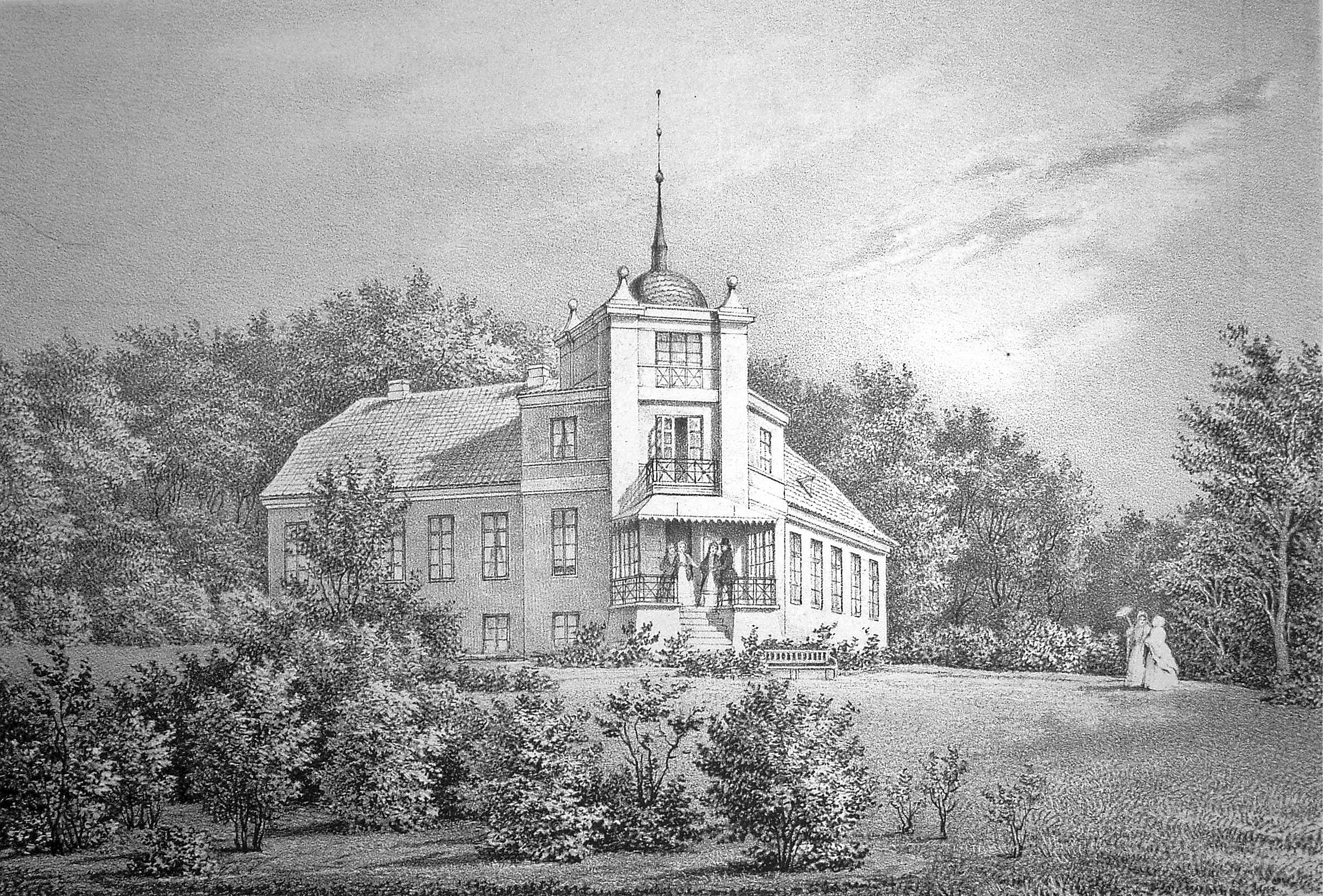 Lekkende er en gammel gård, som nævnes første gang i 1370. Gården ligger i Øster Egesborg Sogn i Vordingborg Kommune. Hovedbygningen er opført i 1838 og er ombygget i 1880